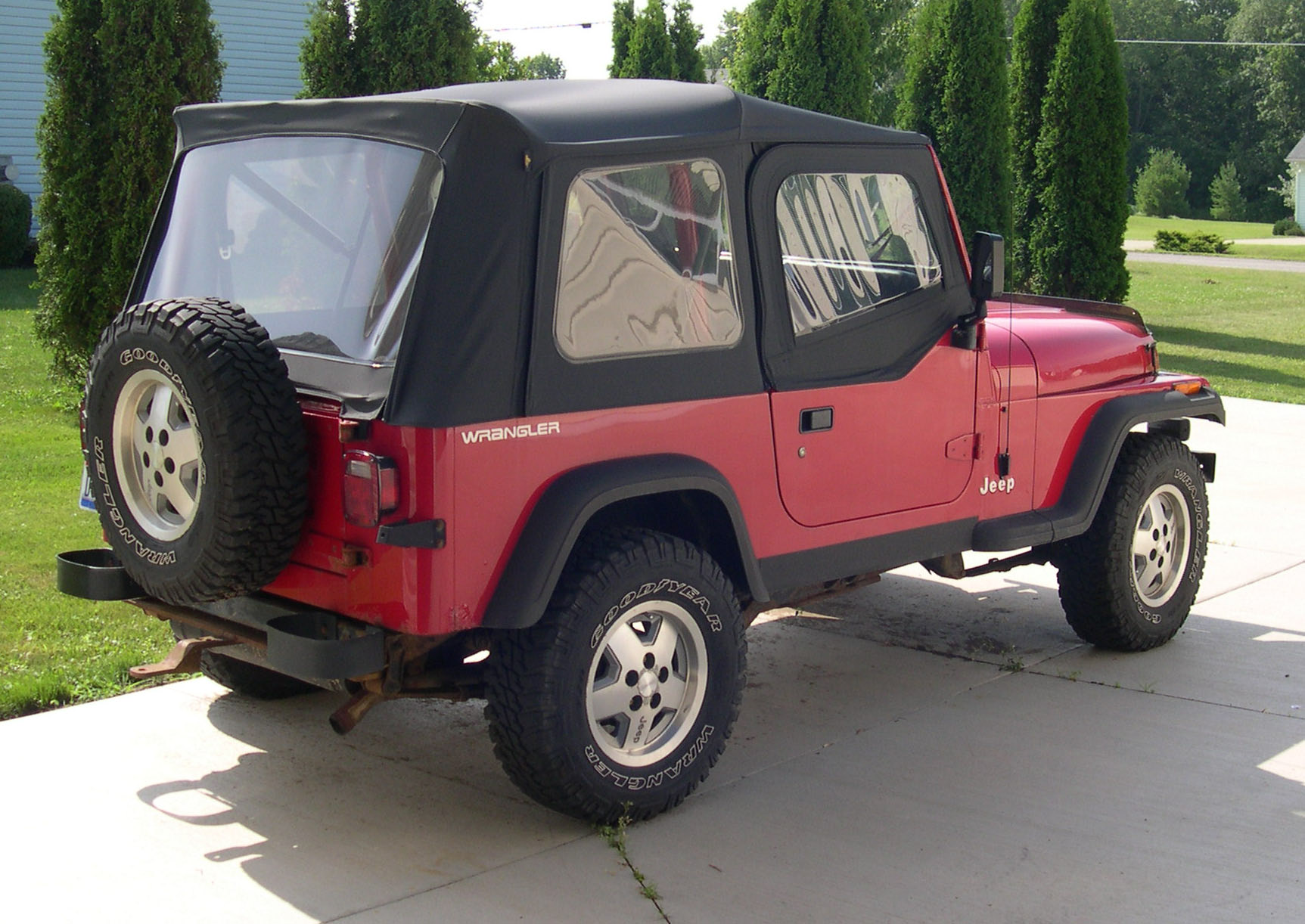 1992 Jeep YJ